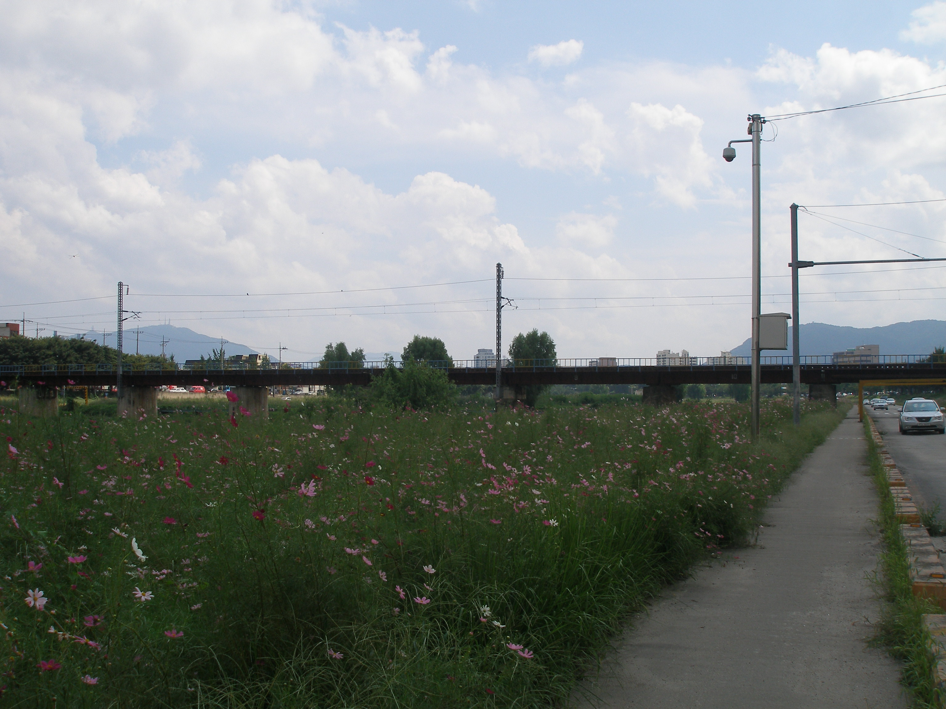 Bridge of Daejeon line over Daejeon strea